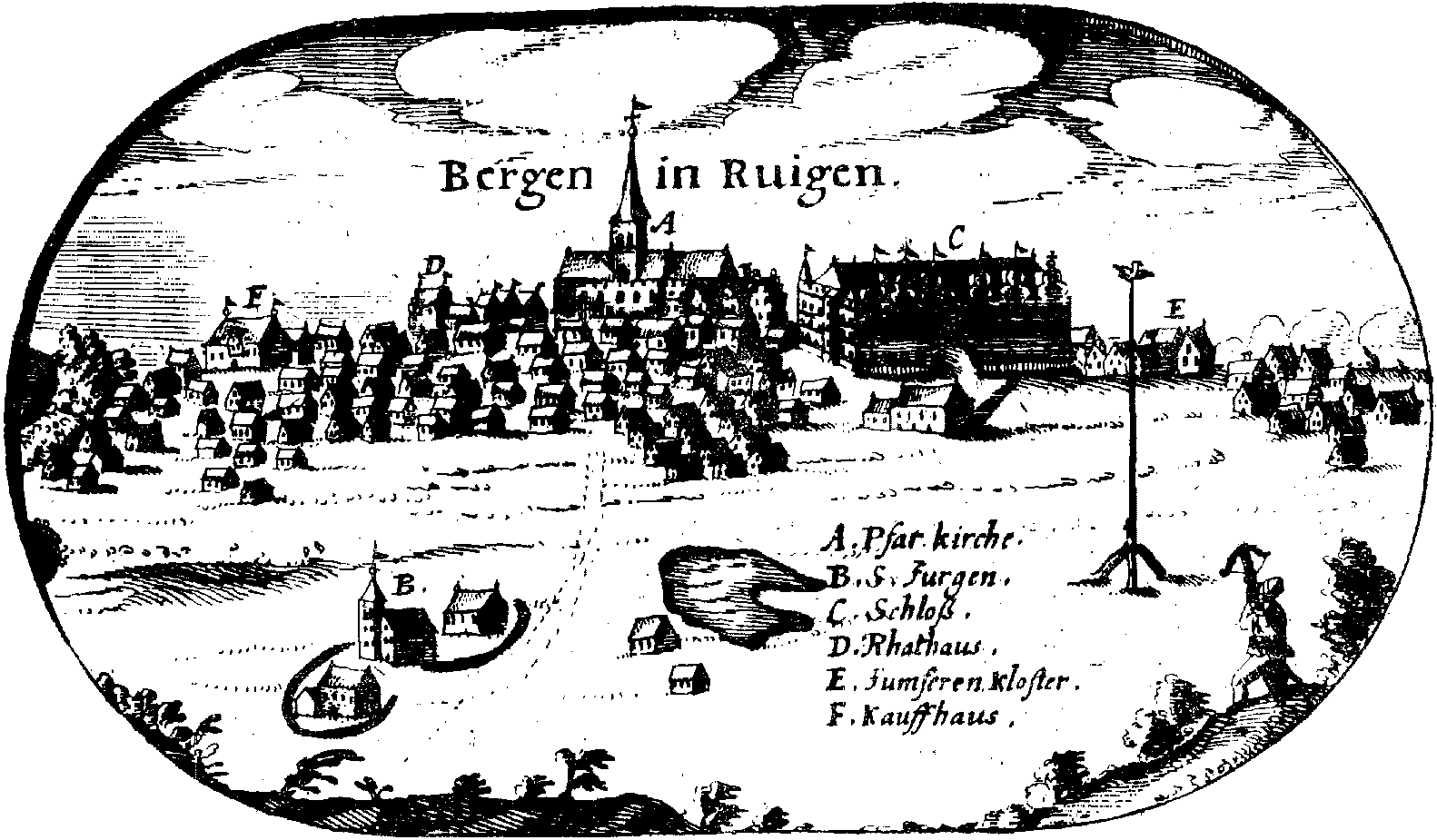 Ansicht von Bergen auf Rügen